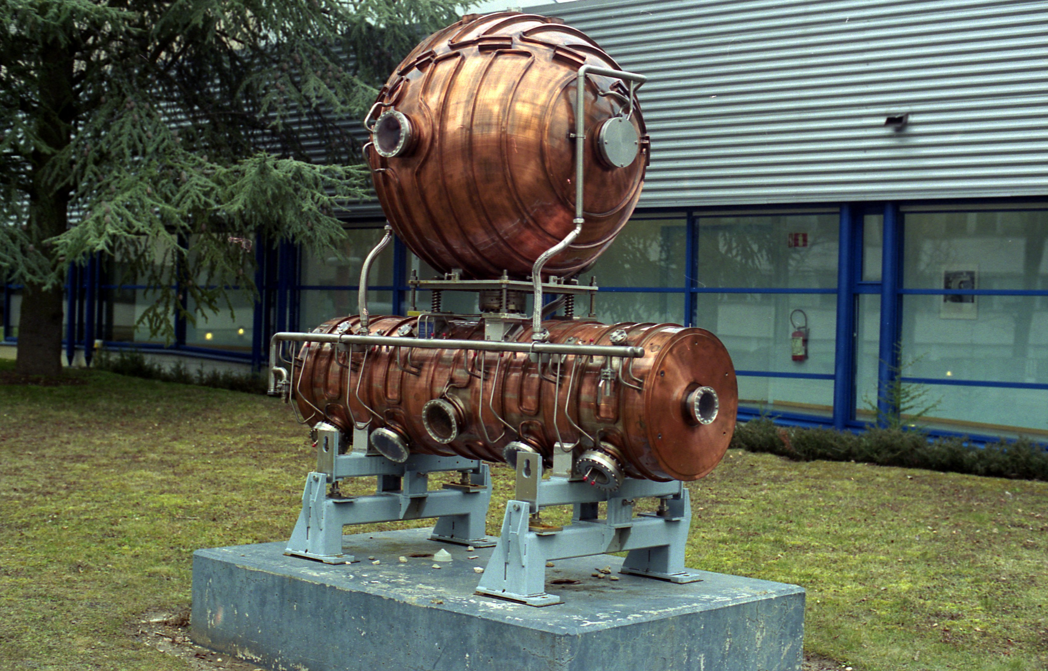 CERN: ATLAS et le Microcosme